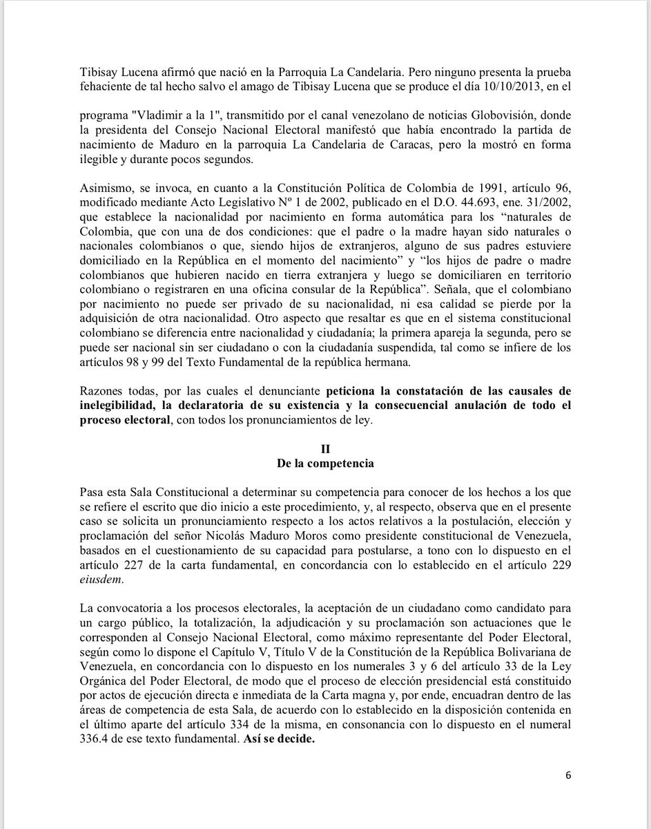 Decisión de Sala Constitucional que admite demanda y exige a la presidencia de Venezuela y al CNE remitir la copia certificada de partida de nacimiento de Nicolás Maduro, así como renuncia a la nacionalidad colombiana.